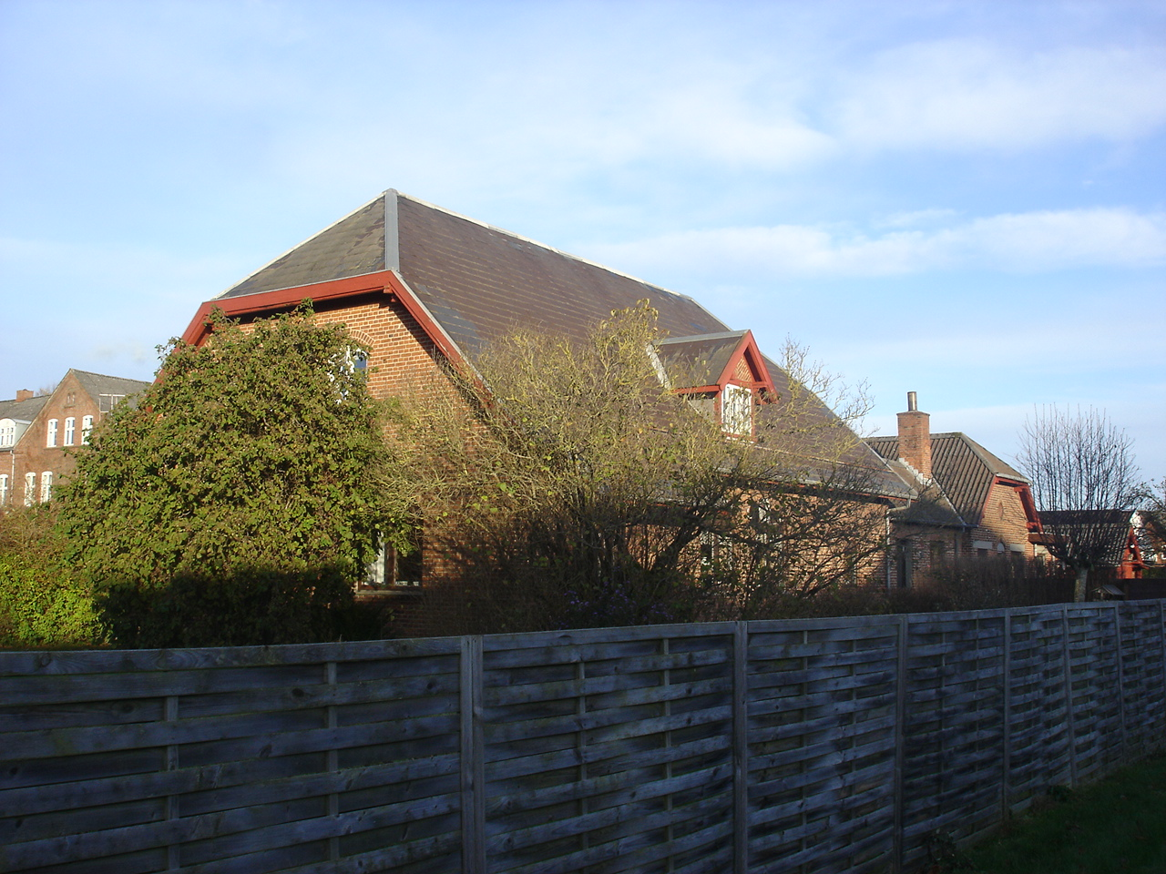 Thorsø Station fra sporsiden